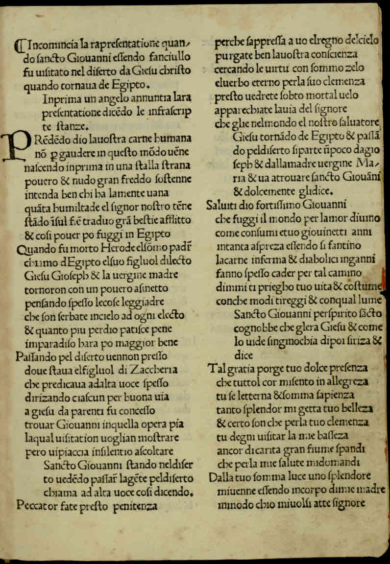 Rappresentazione di San Giovanni Battista. - [Firenze] : [Bartolomeo de' Libri], [circa 1490]. - 4 c. ; [*]⁴ ; 4º.